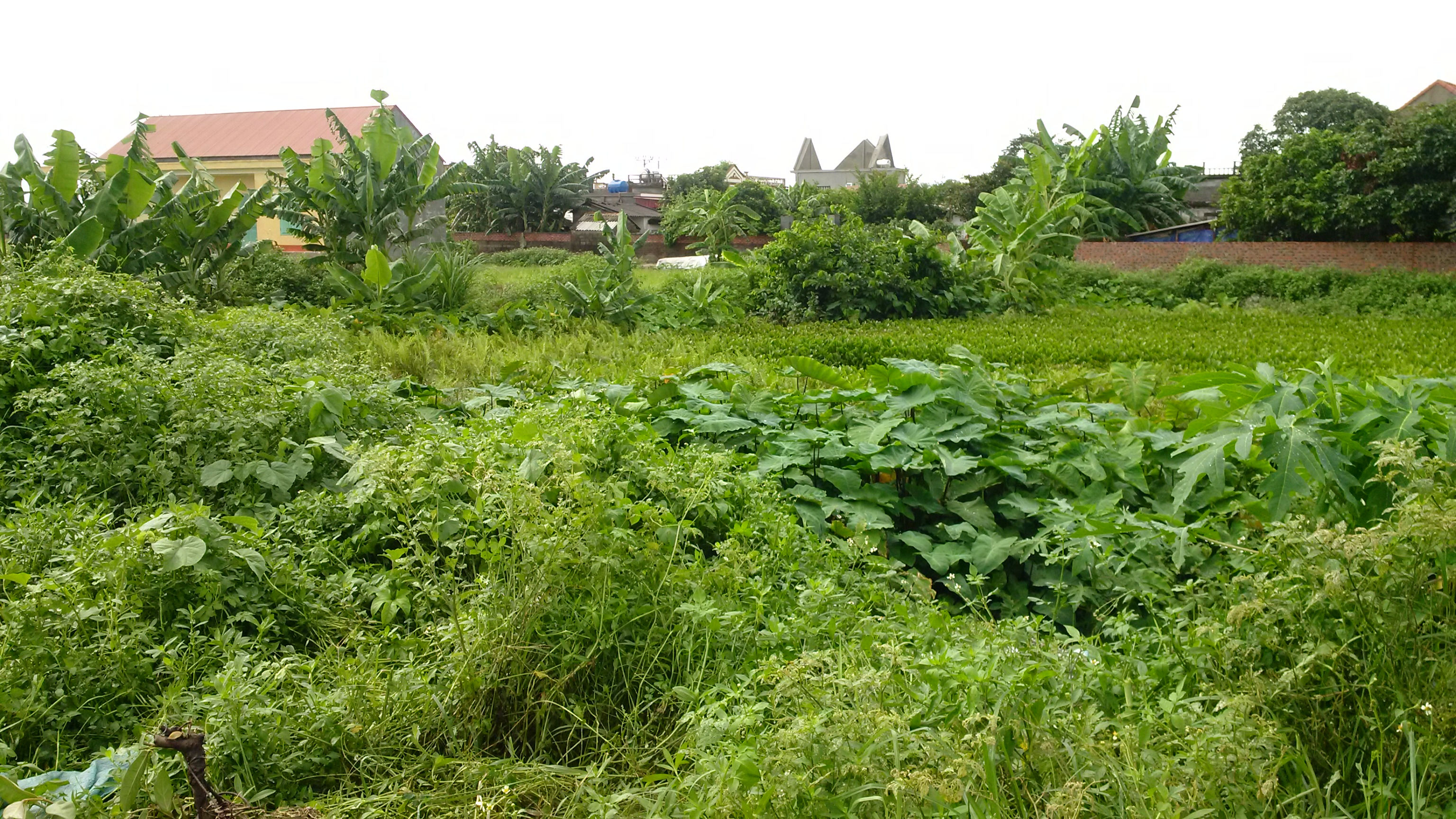 Vị trí mộ cổ Đống Cao còn lại ngày nay. Ảnh chụp 28.06.2017